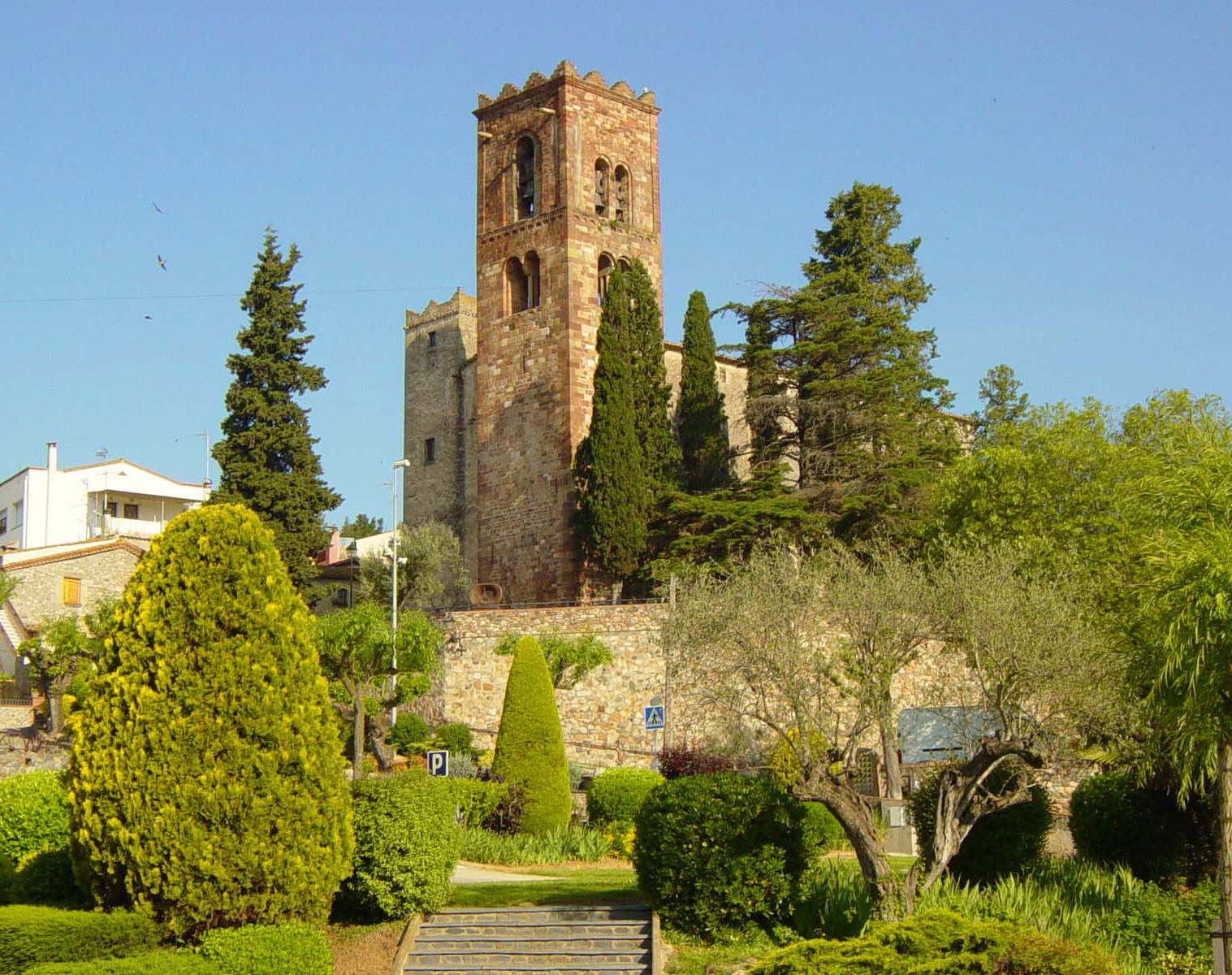 La Torre d'homentage del castell de Vilamajor i l'esglesia de Sant Pere de Vilamajor